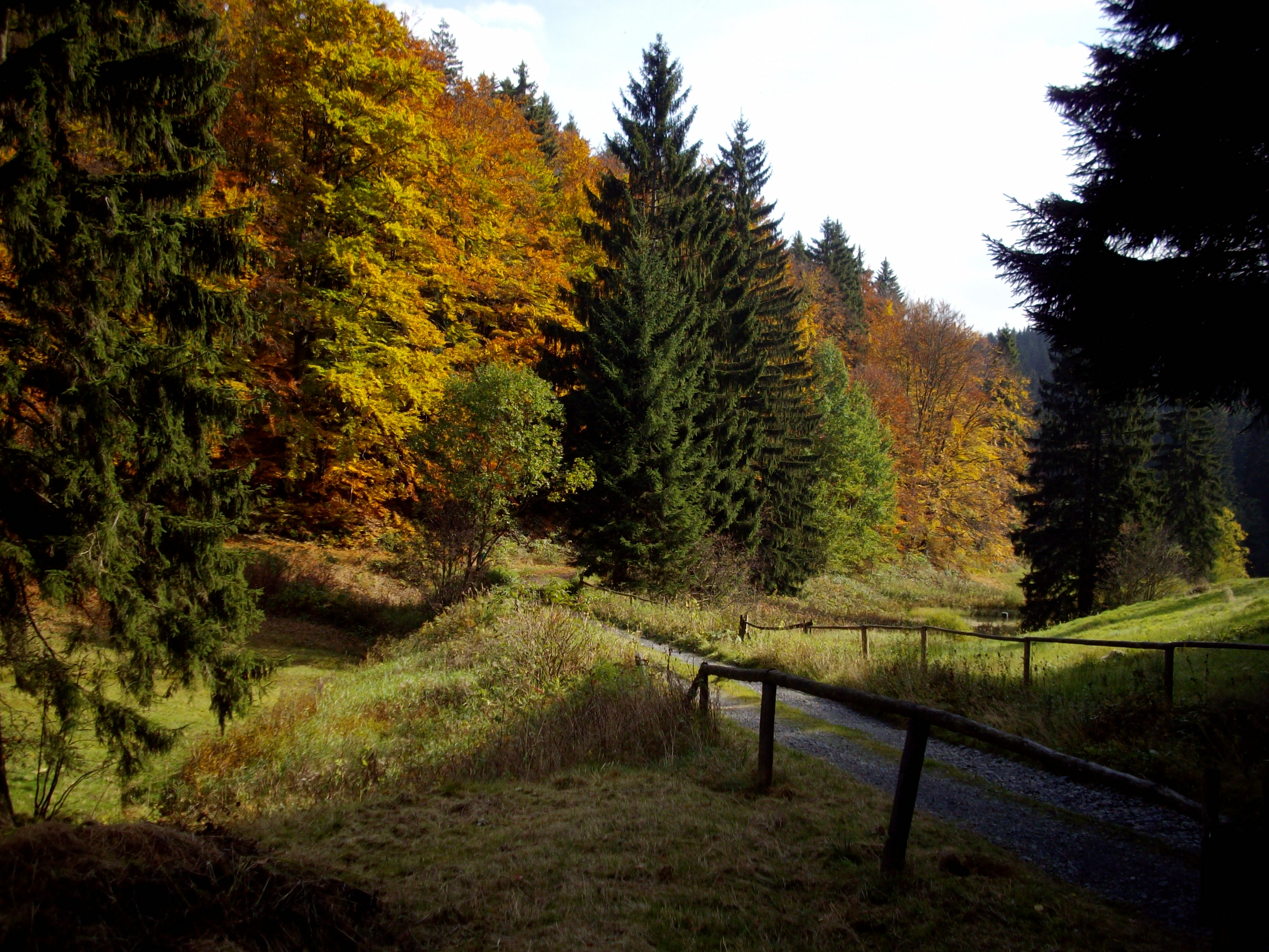 Im NSG Röthengrund im Oktober